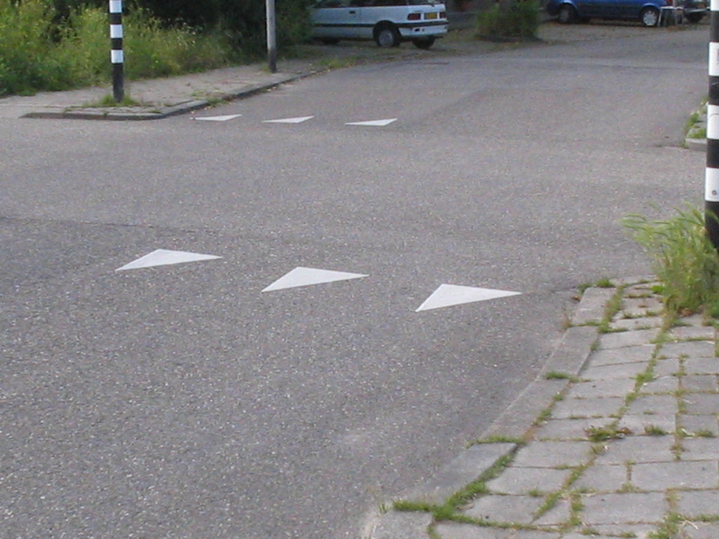 Haaientanden, Delft Tanthof.